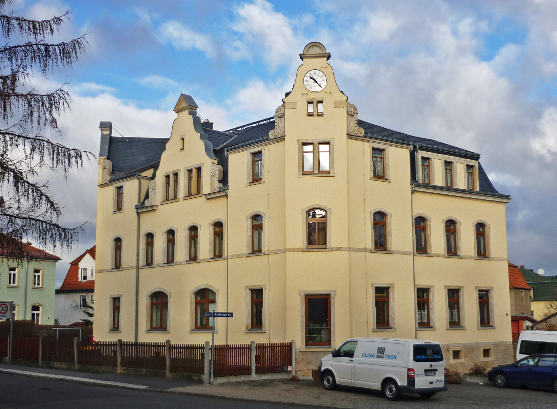 Ehem. Rathaus in Dresden-Gittersee